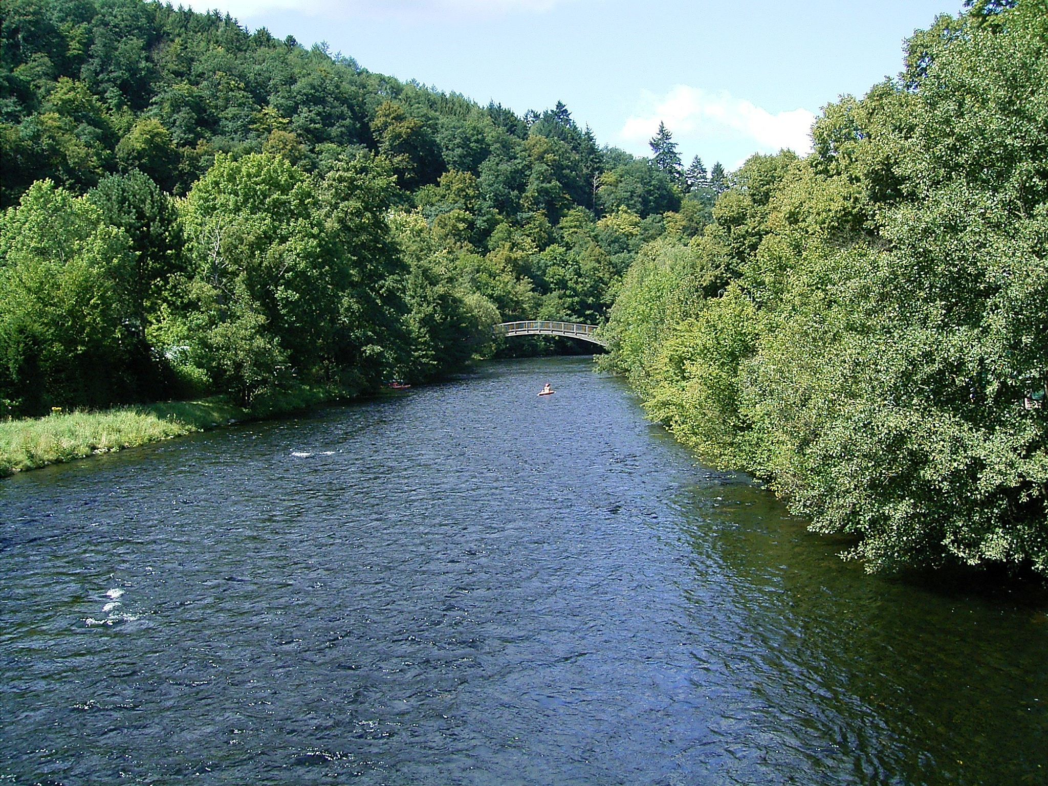 Rur in Heimbach